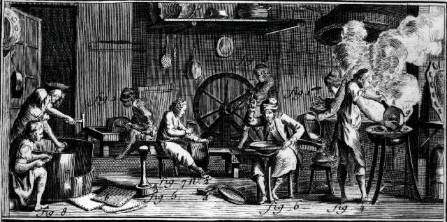 Kobberslagerverksted